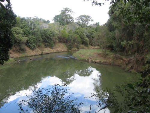 Wilson River, Nouvelle-Galles du Sud, Australie